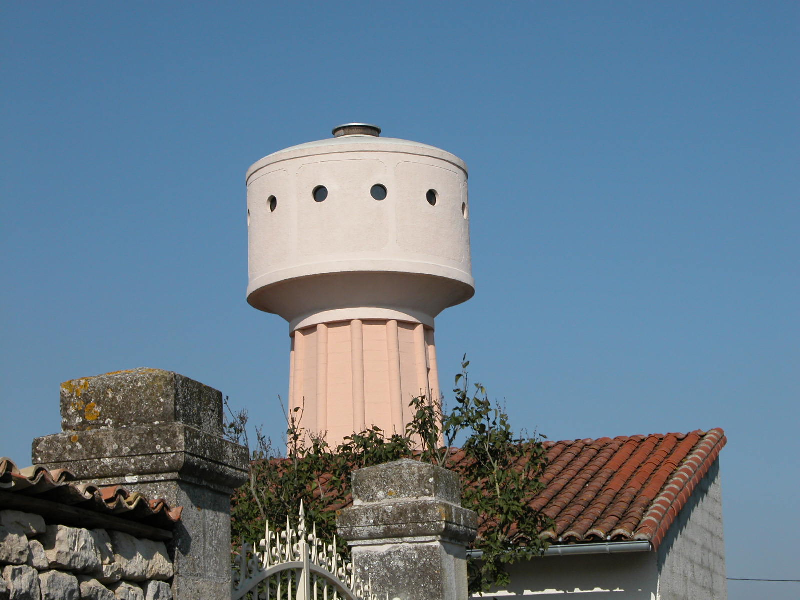 Photographie du château d'eau de La Rochénard